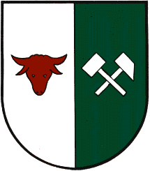 Wappen der Gemeinde Stiwoll in Österreich